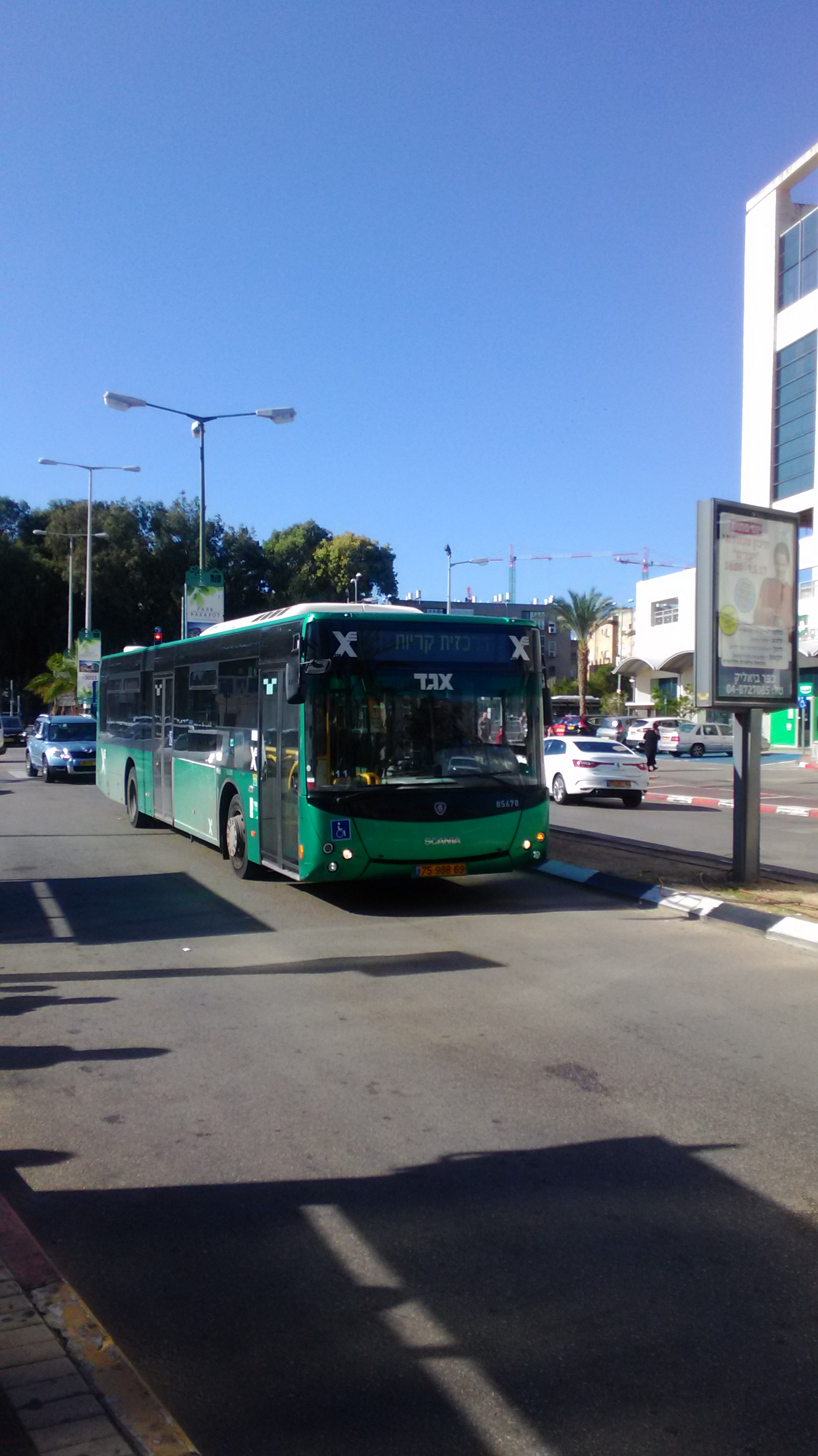 אוטובוס בקריית ביאליק